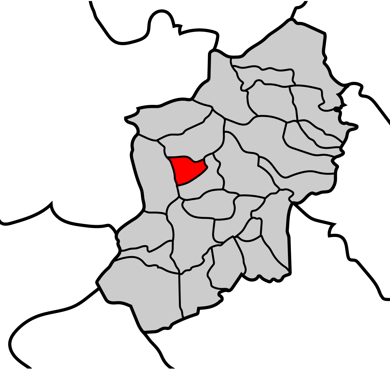 Mapa de la parroquia de O Cereixal ayuntamiento de Becerreá